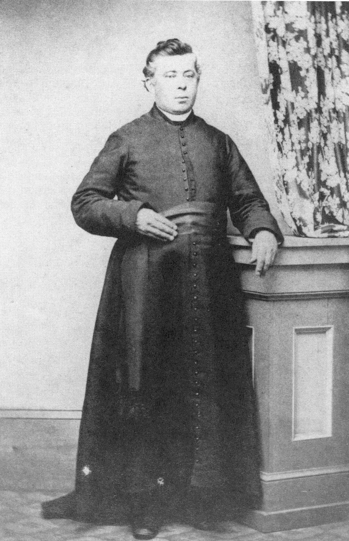 Joseph Pelletier, curé de Caraquet entre 1869 et 1876.